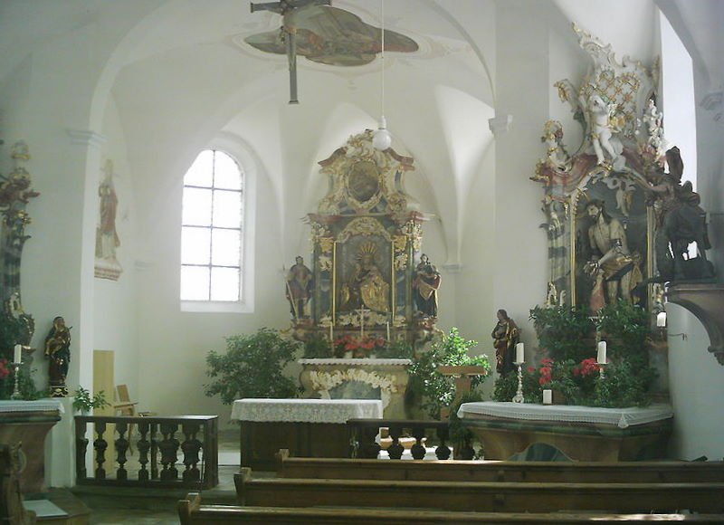 St. Anna Kapelle von innen